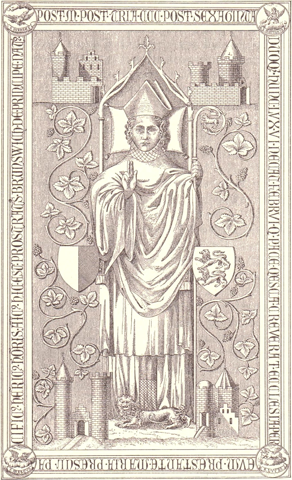 Grabplatte Heinrichs III., Bischof von Hildesheim 1331-1363; Zeichnung des verlorenen Originals